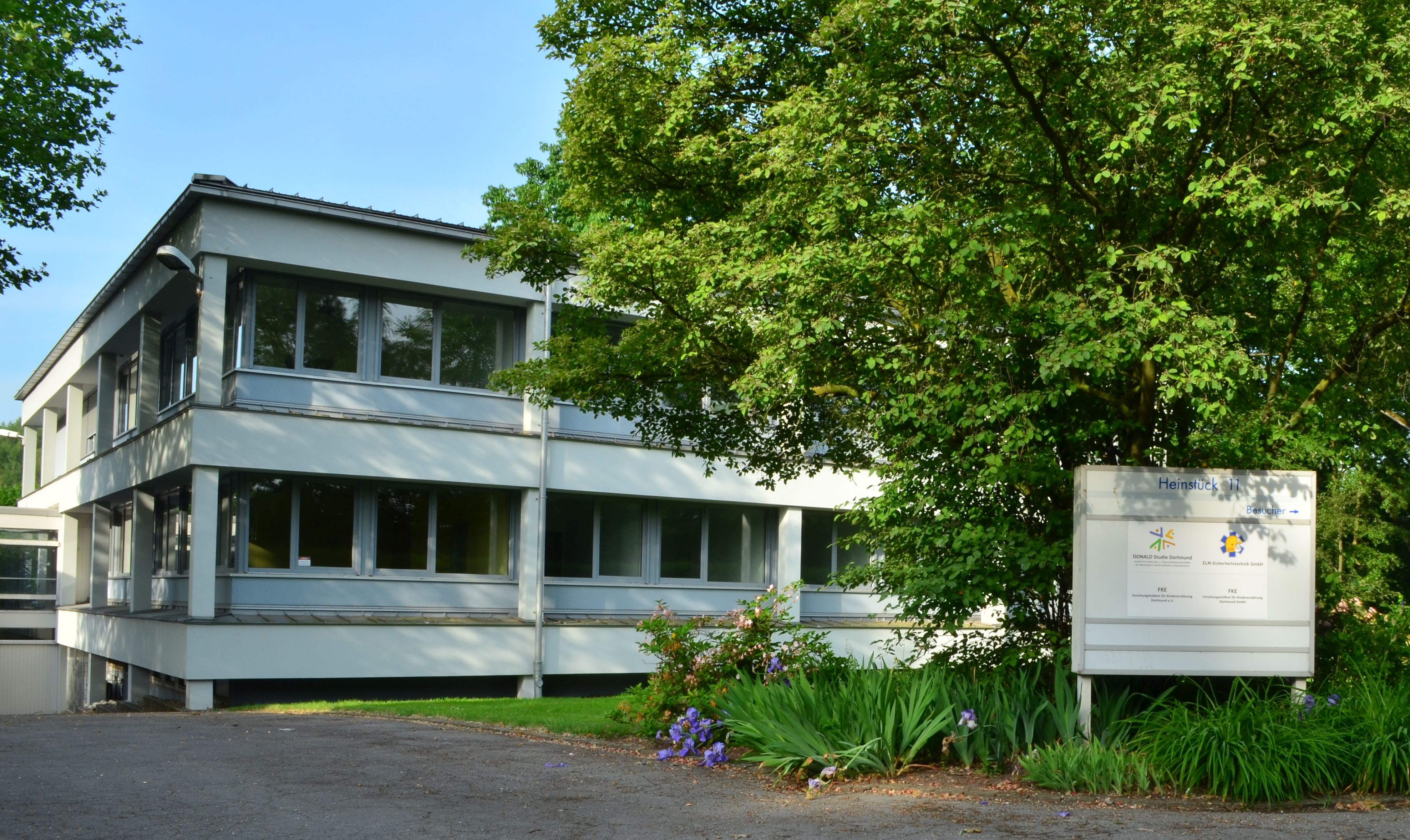 Studienzentrum der DONALD Studie in Dortmund-Brünninghausen